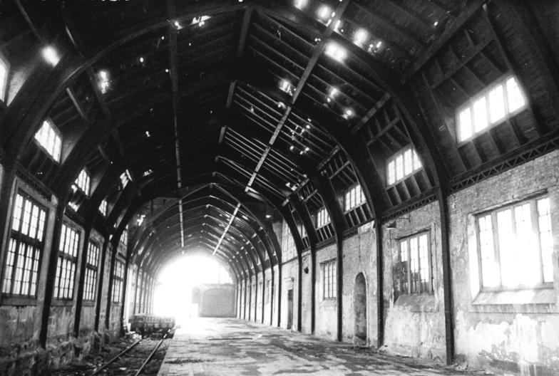 ADN-Karl-Heinz Schindler-26.12.90- Potsdam: Bahnhof - Winterschlaf für den ehemaligen "Kaiserbahnhof" in Wildpark-West. Es scheint sich nun tatsächlich ein Licht am Ende des Tunnels abzuzeichnen, denn ab 1991 soll dem fortschreitendem Verfall des historischen Bauwerks mit umfassenden Rekonstruktionsarbeiten begegnet werden. Ehrgeizige Projekte sehen darüberhinaus vor, bis zum Jahre 1993 das Umfeld der Anlage mit Hotels und Freizeiteinrichtungen zu bebauen.